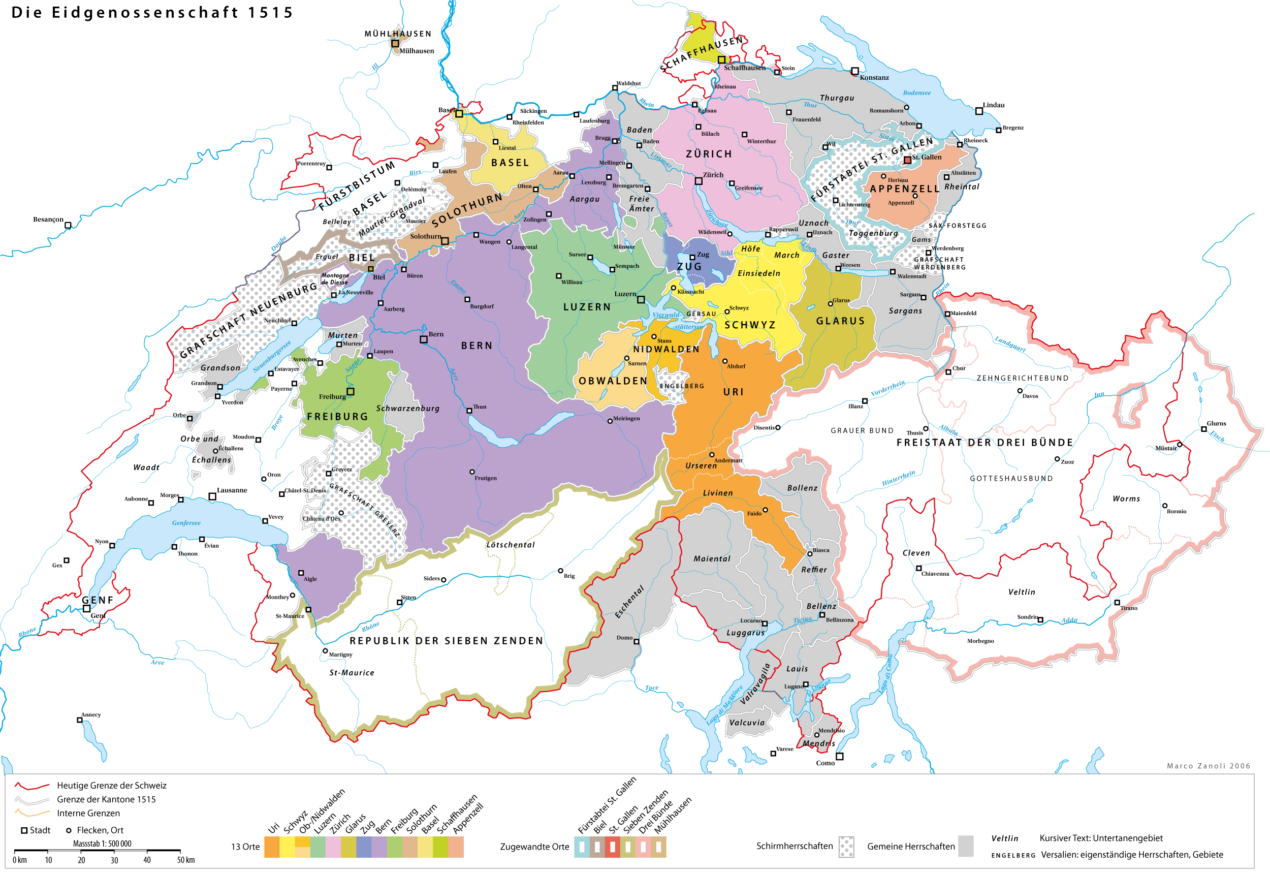 Die schweizerische Eidgenossenschaft um 1515 nach der Schlacht bei Marignano während der Mailänderkriege